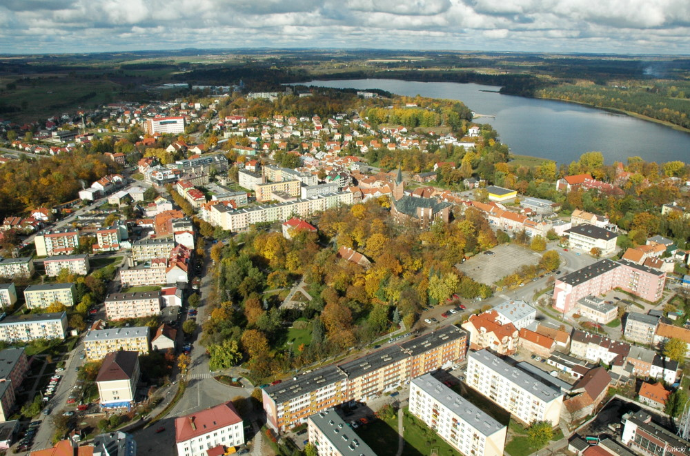 Olecko - rynek